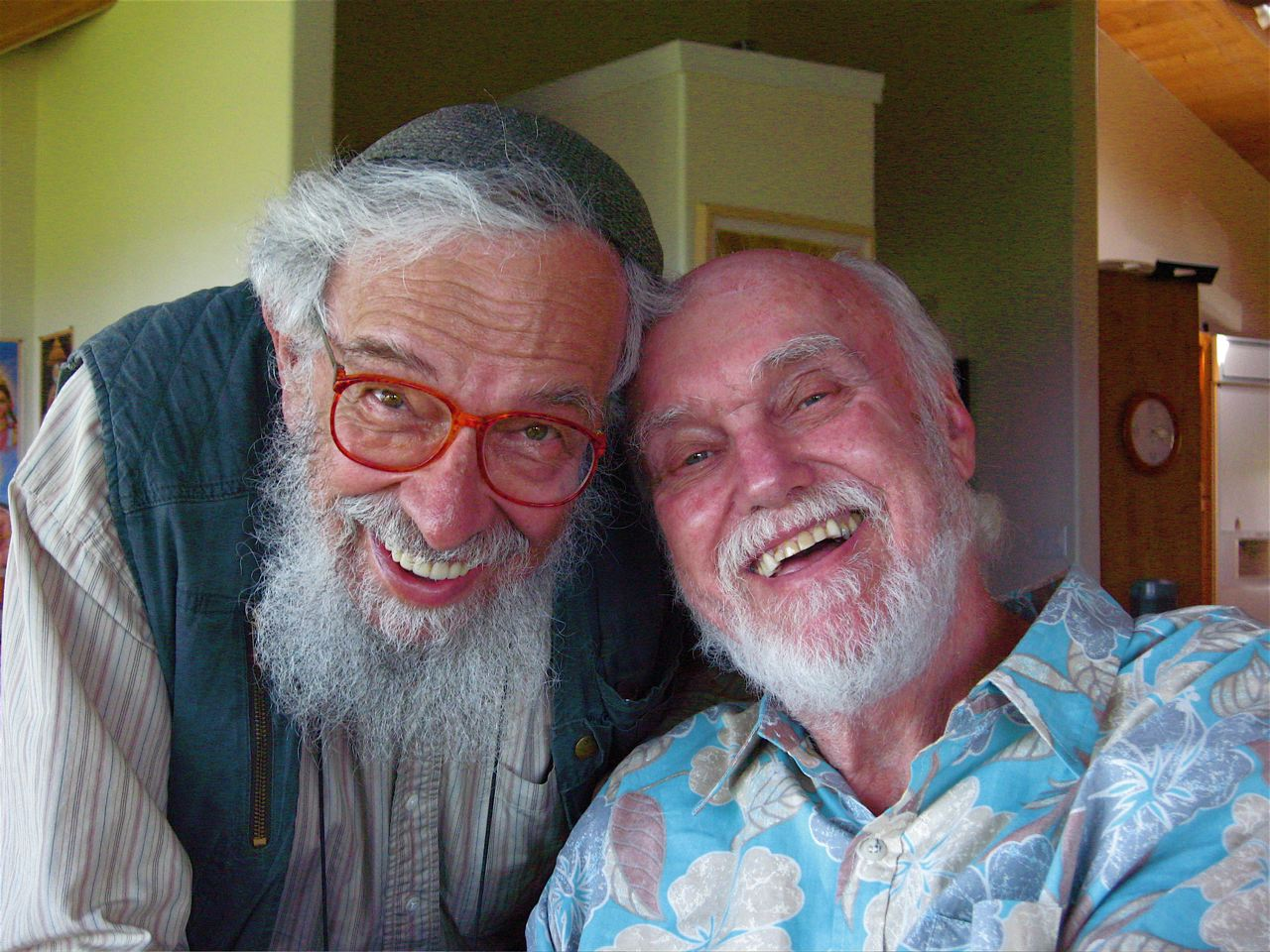 Zalman Schachter-Shalomi (left) and Ram Dass